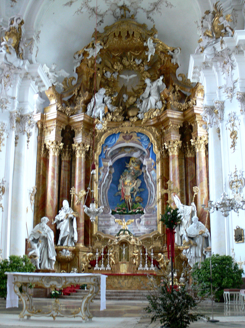 Marienmünster Dießen (ehem. Augustiner-Chorherren-Kirche Mariä Himmelfahrt, heute Pfarrkirche, Dießen am Ammersee) Hochaltar, Entwurf: François de Cuvillißes d. Ä., Ausführung: Joachim Dietrich (Zuschreibung nach dem Klosterchronisten J. dall'Abaco), um 1738 Mittelzone, mit heruntergelassenem Altarblatt, dahinter die Kulissenarchitektur Johann Georg Bergmüllers für die Darstellung des hl. Grabes, zur Osterzeit genutzt als Hintergrund für eine Statue "Der auferstandene Christus" François de Cuvilliés (1695–1768) Alternative namesFrançois de Cuvilliés the ElderDescription Belgian sculptor and architect Date of birth/death23 October 169514 April 1768Location of birth/deathSoignies (Hainault)MunichWork locationMunichAuthority control VIAF: 10118068 LCCN: n86853808 GND: 118523104 BnF: cb14957414s ULAN: 500007421 ISNI: 0000 0000 8089 5684 WorldCat Joachim Dietrich (1690–1753) Alternative namesDietrich, Johann JoachimDescription German sculptor Date of birth/death16901753Location of birth/deathTheilenberg (bei Spalt)MunichWork locationMünchen